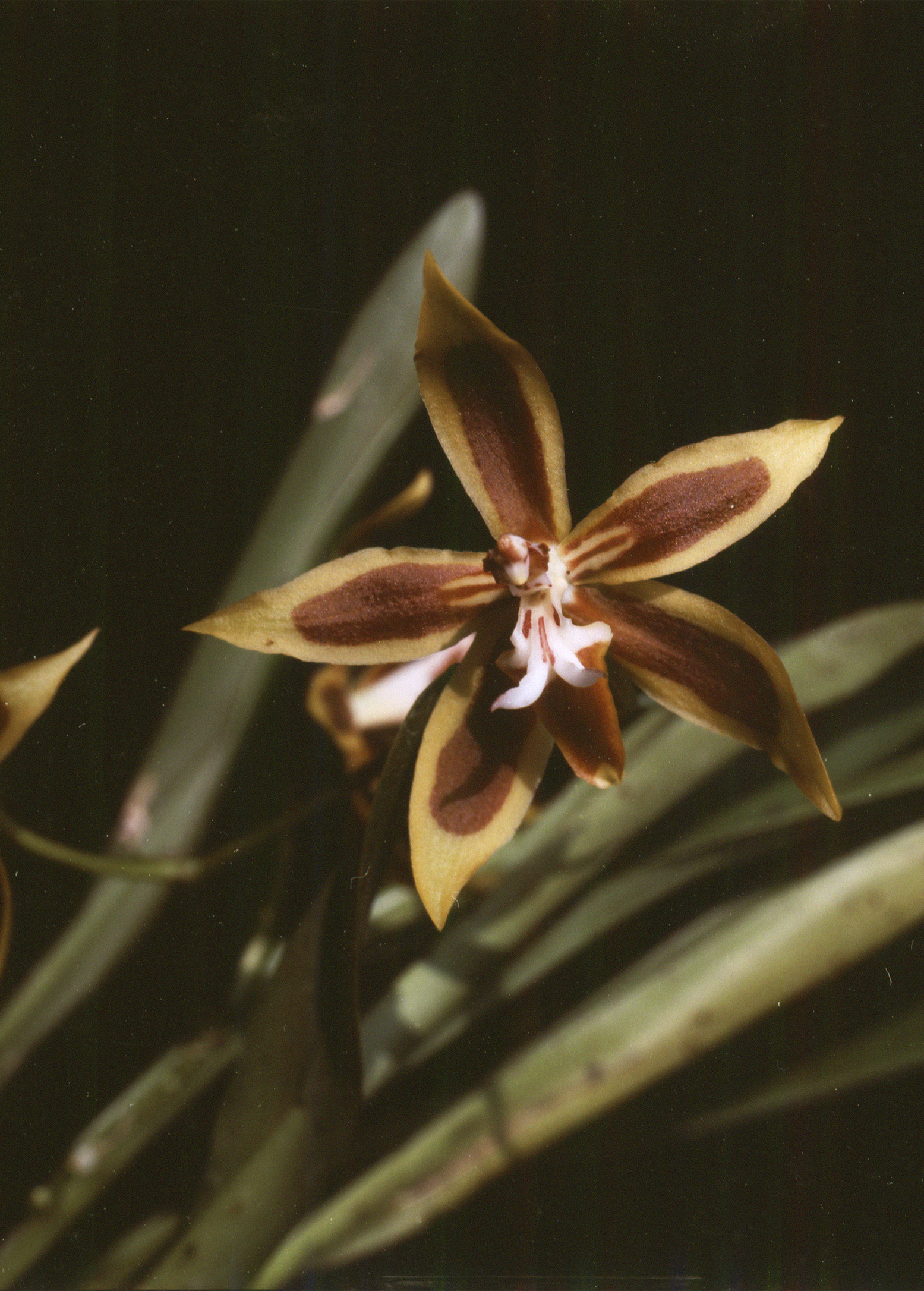 Orchidee der Gattung Odontoglossum: Odontoglossum mirandum. Aufnahme von 1982